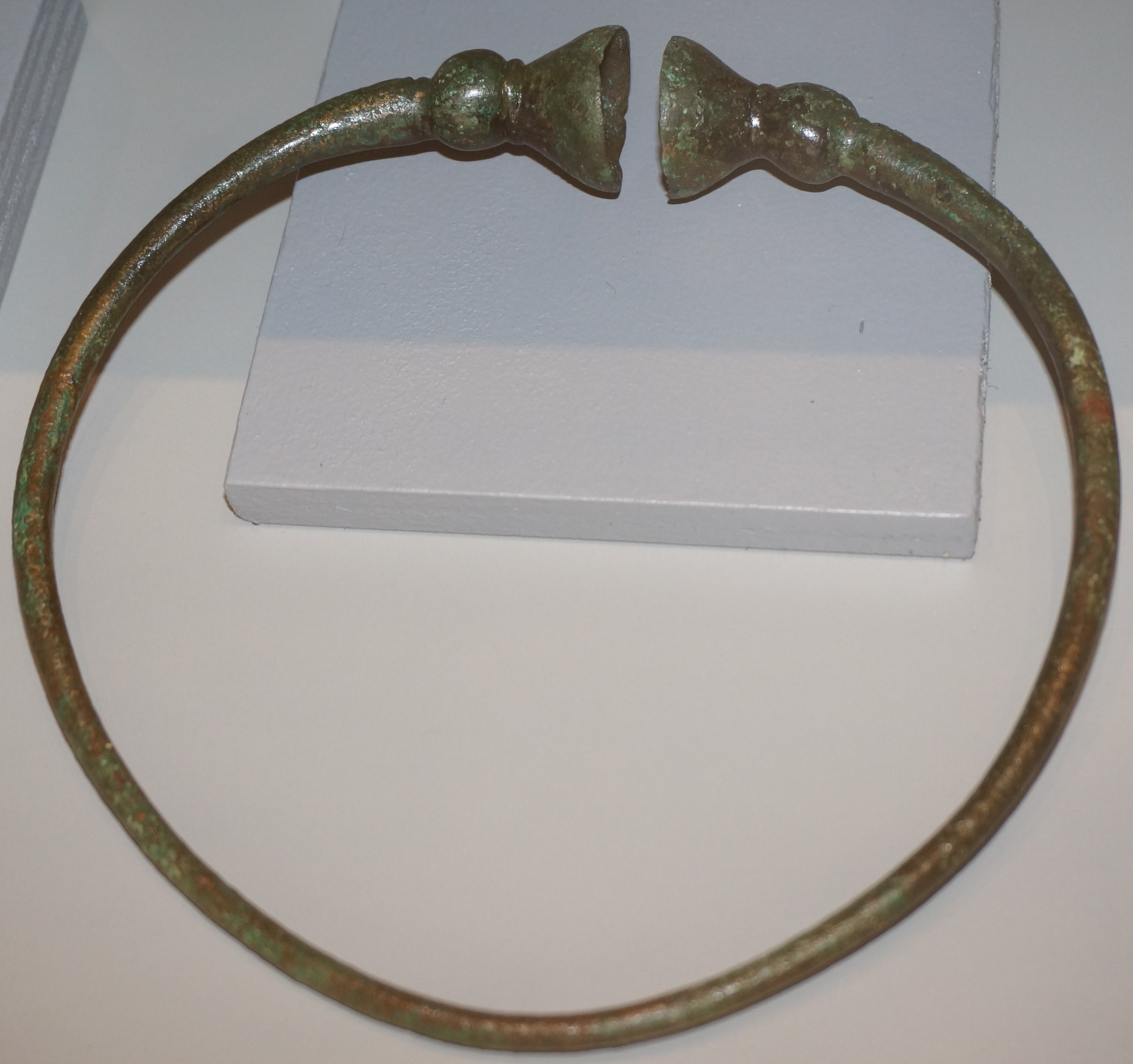 présenté au Musée municipal de Saint-Dizier.